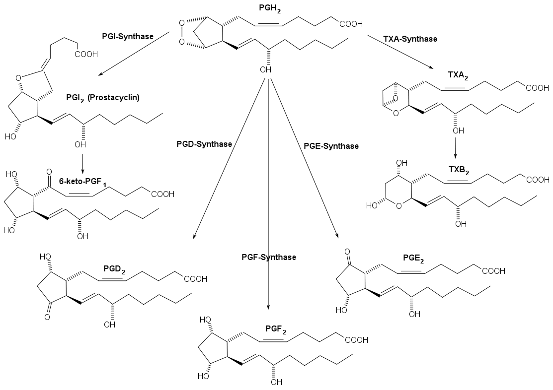 Synthese der verschiedenen Prostaglandine aus PGH2